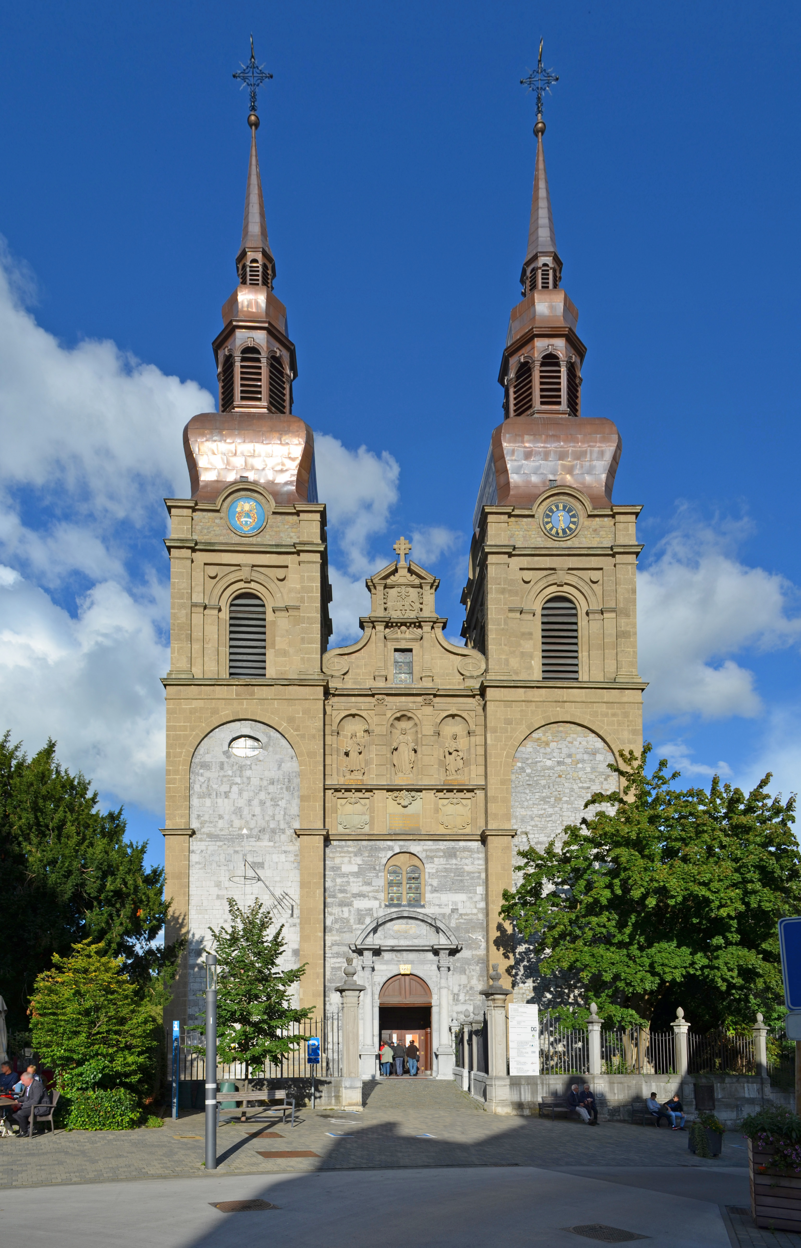 St.-Nikolaus-Kirche in Eupen This image was created with Hugin.